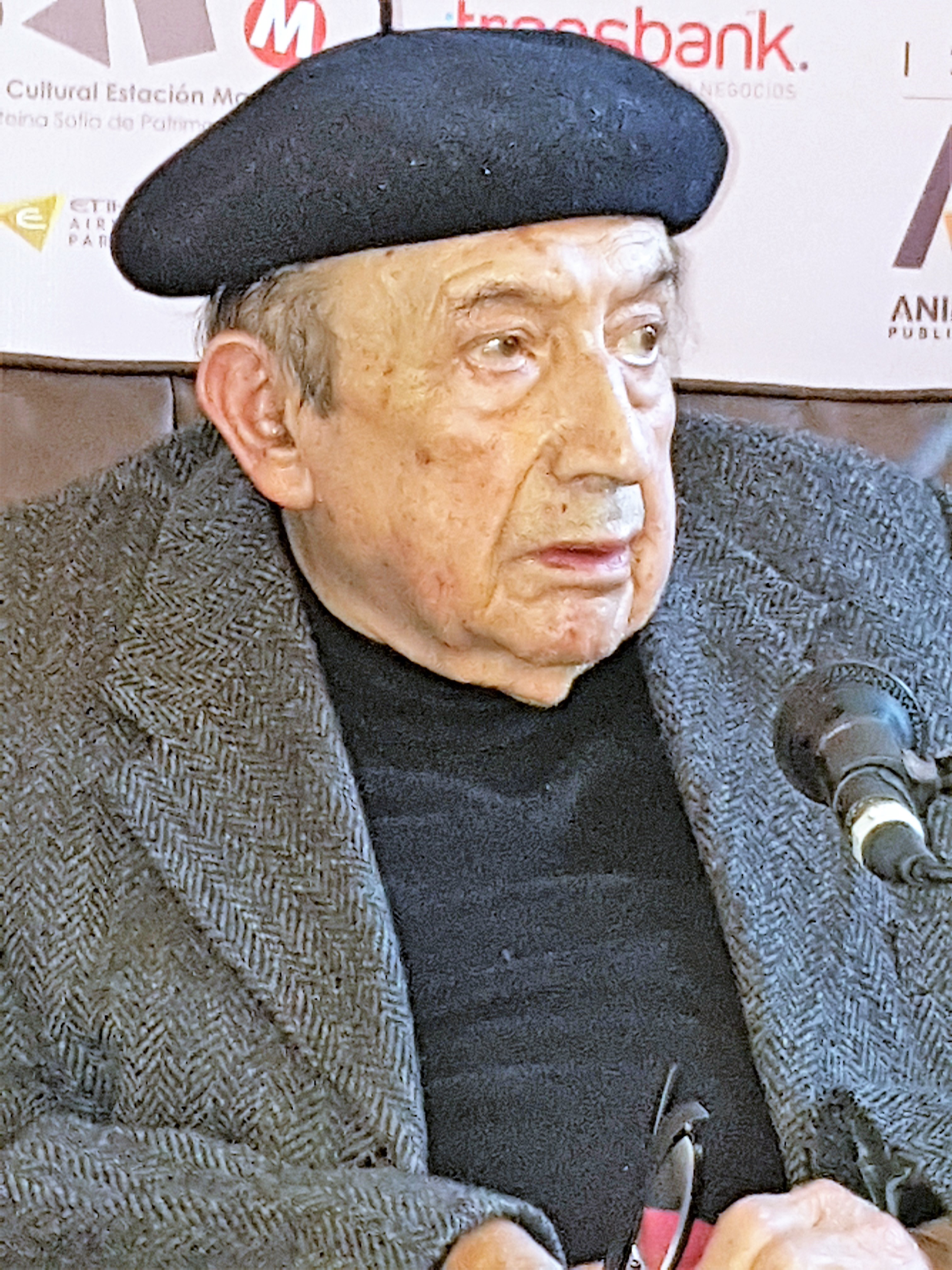 El poeta chileno Efraín Barquero en la Feria Internacional del Libro de Santiago 2017.